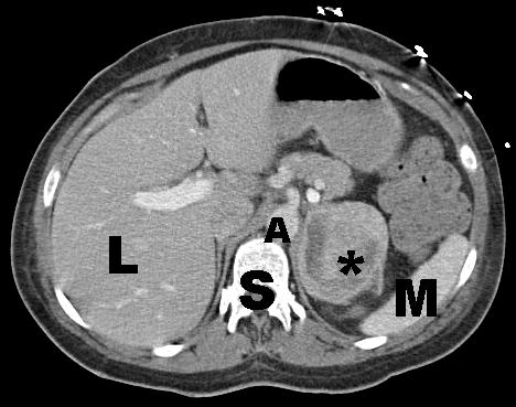 Axialer Schnitt durch den Oberbauch. Phäochromozytom. Unbeschriftete Version unter File:Phaeochromozytoma CT.jpg.L: Leber; S: Wirbelkörper; A: Aorta; M: Milz; *: Phäochromozytom